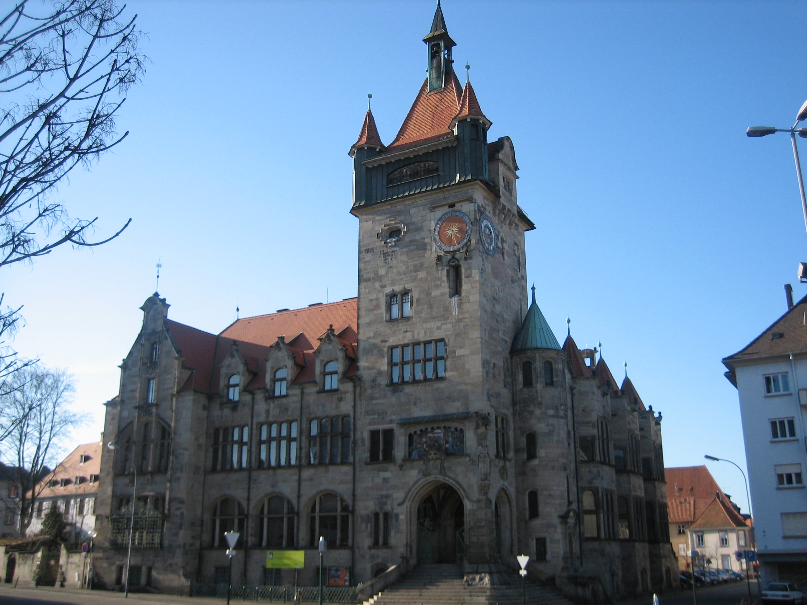 Musée Historique à Haguenau (France)